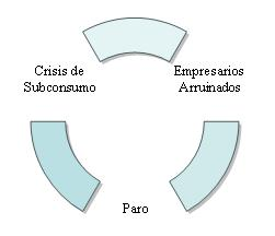 Éste círculo vicioso se repitió desde el Crack del 29 hasta el año 1932